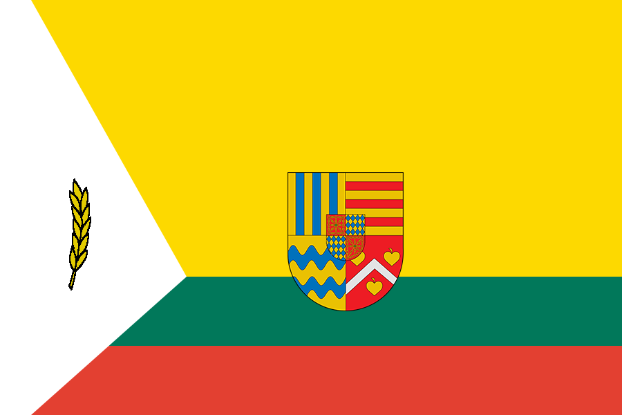 Bandera de Orkoien